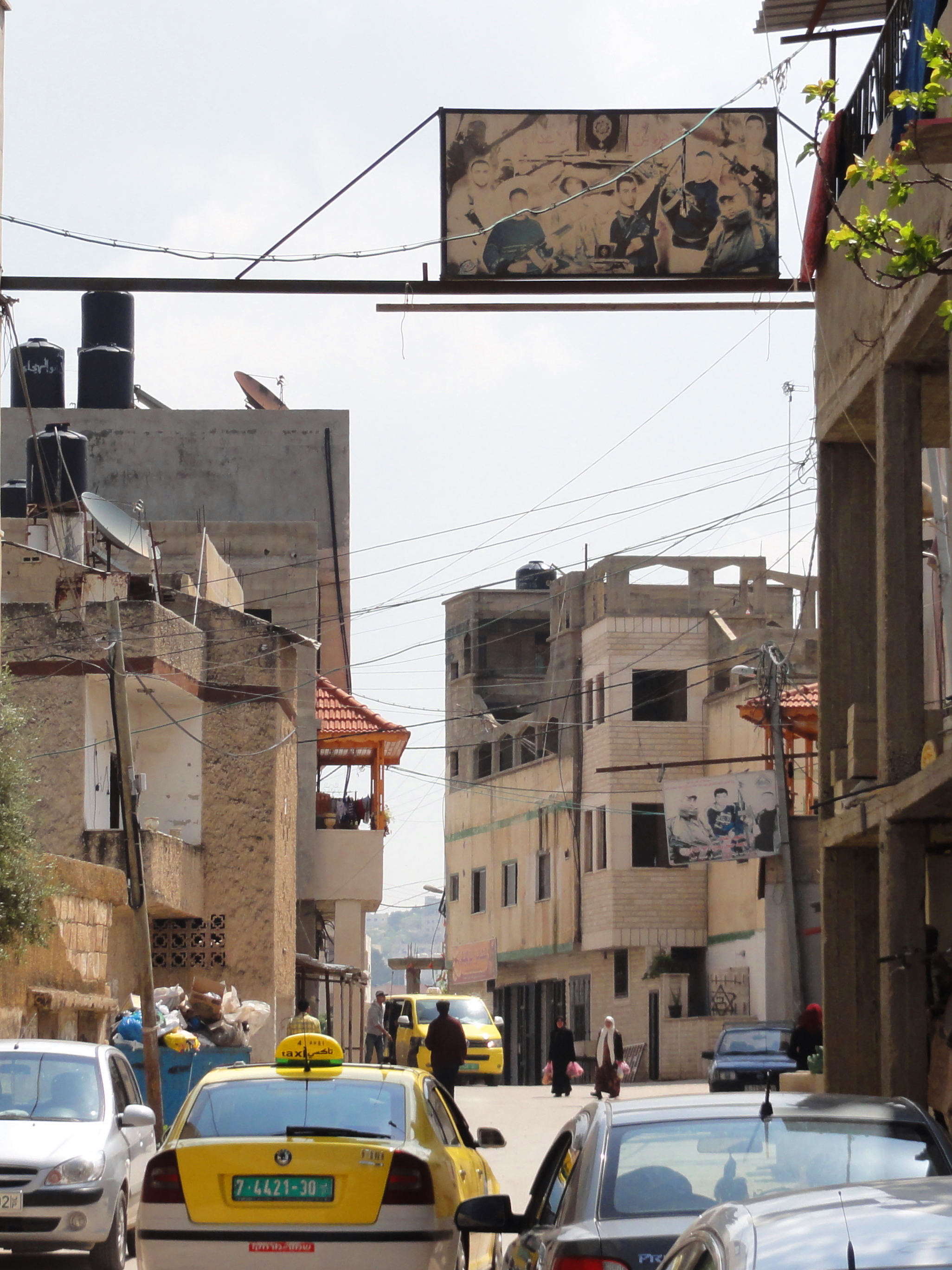 Jenin RC